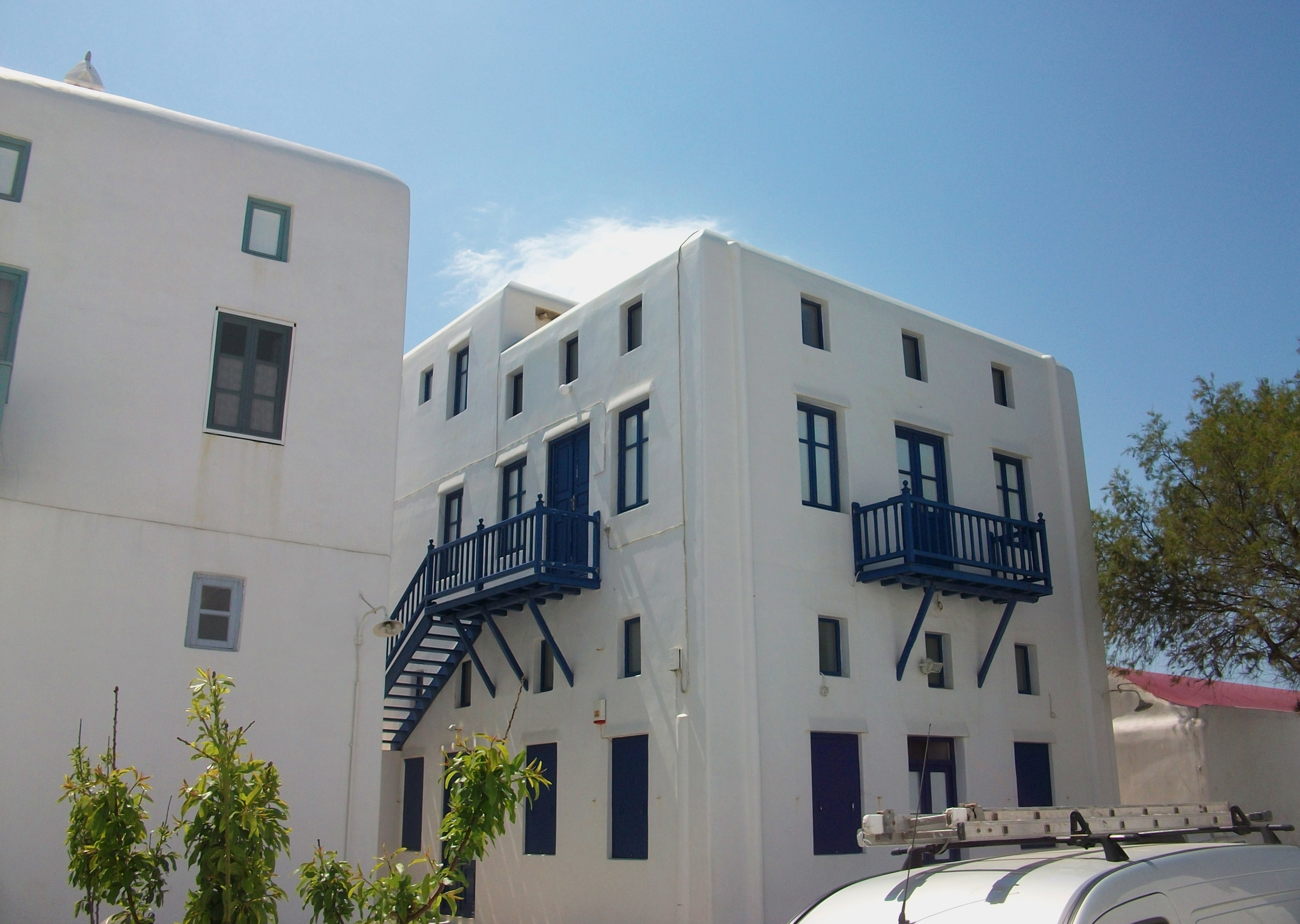 Edificis de Míkonos.